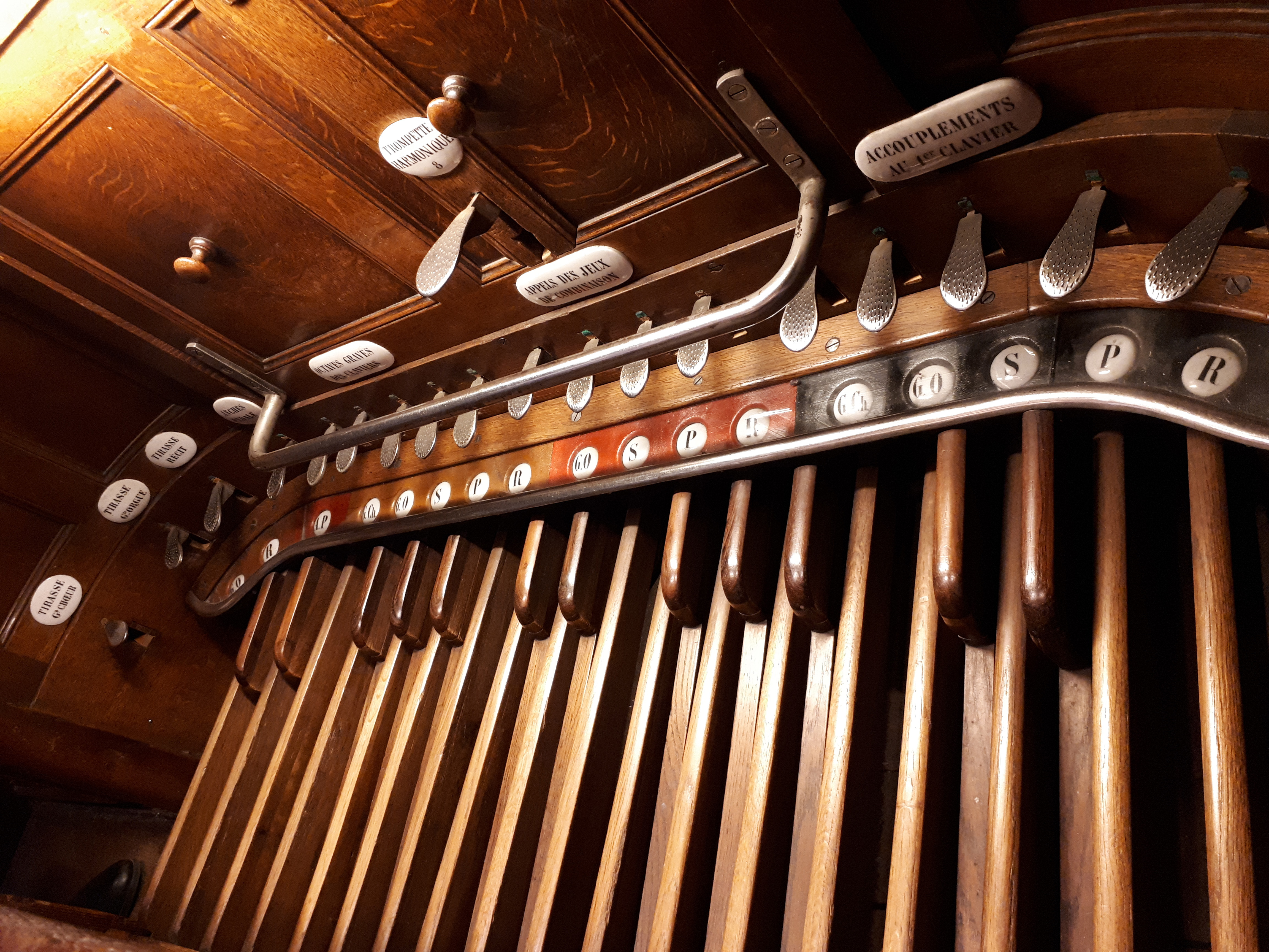 I pedaletti e la pedaliera